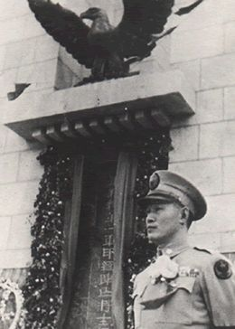 廣州市新一軍印緬陣亡將士公墓，孫立人站在四柱紀念塔前。